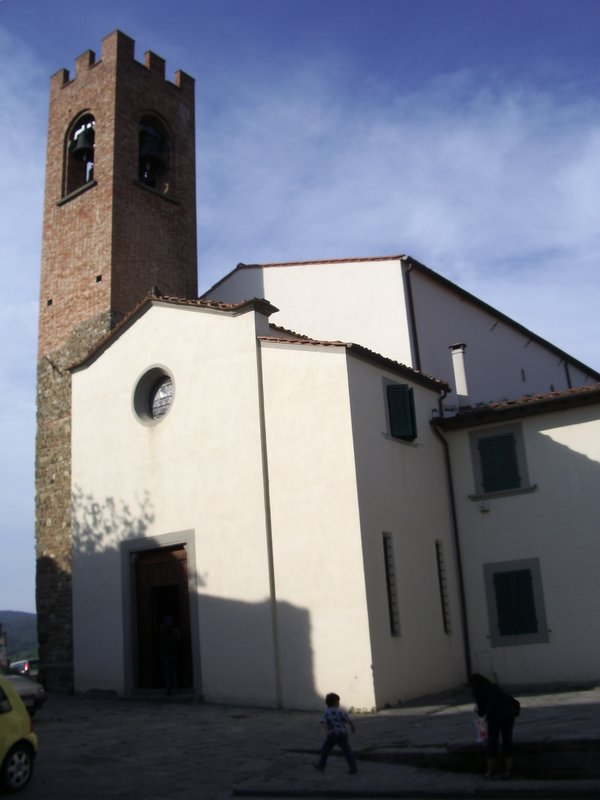 Propositura di S. Stefano. Nell'interno della chiesa si trova l'urna contenente il corpo di Santa Grania.